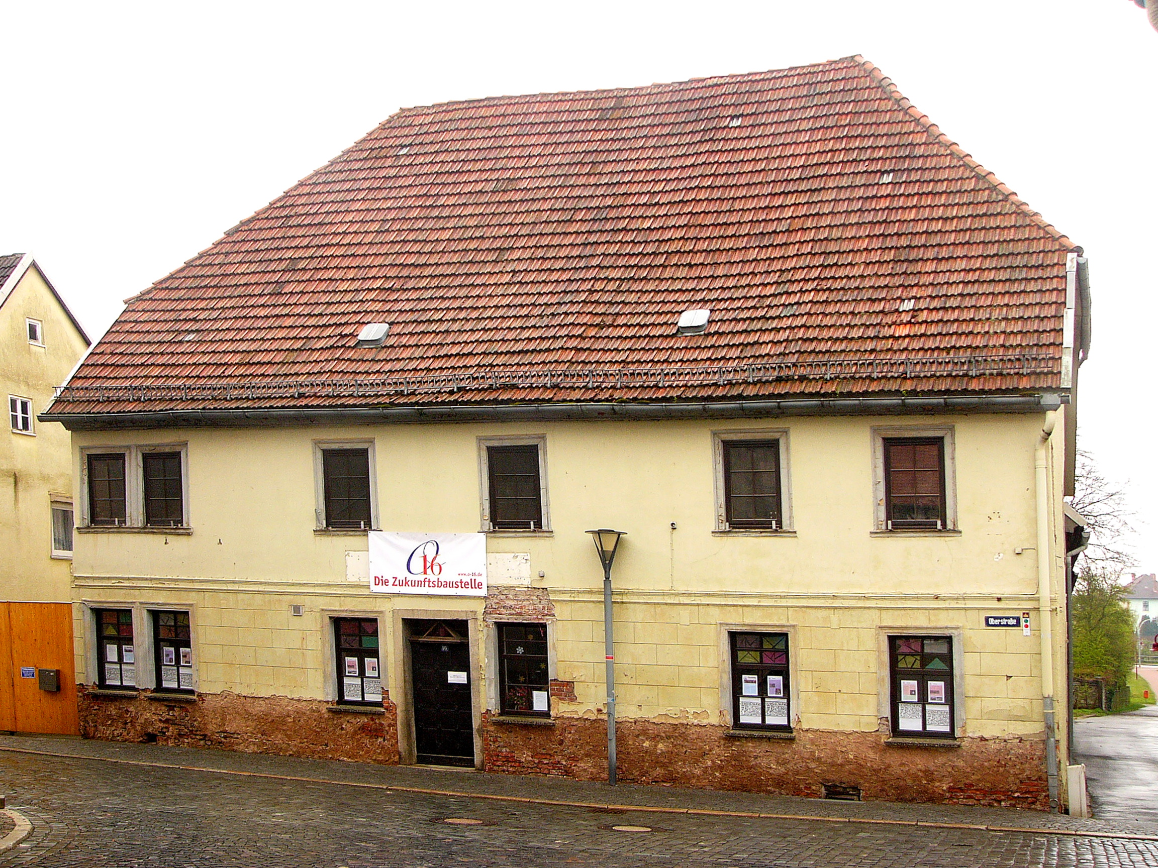 17. Jhd. Gasthof Weisses Ross aus einem Fachwerkwohnhaus errichtet, Krüppelwalmdach und klassizistische Putzgliederung aus der 1. Hälfte des 19. Jhd., Wirtschaftsflügel aus gleicher Zeit.